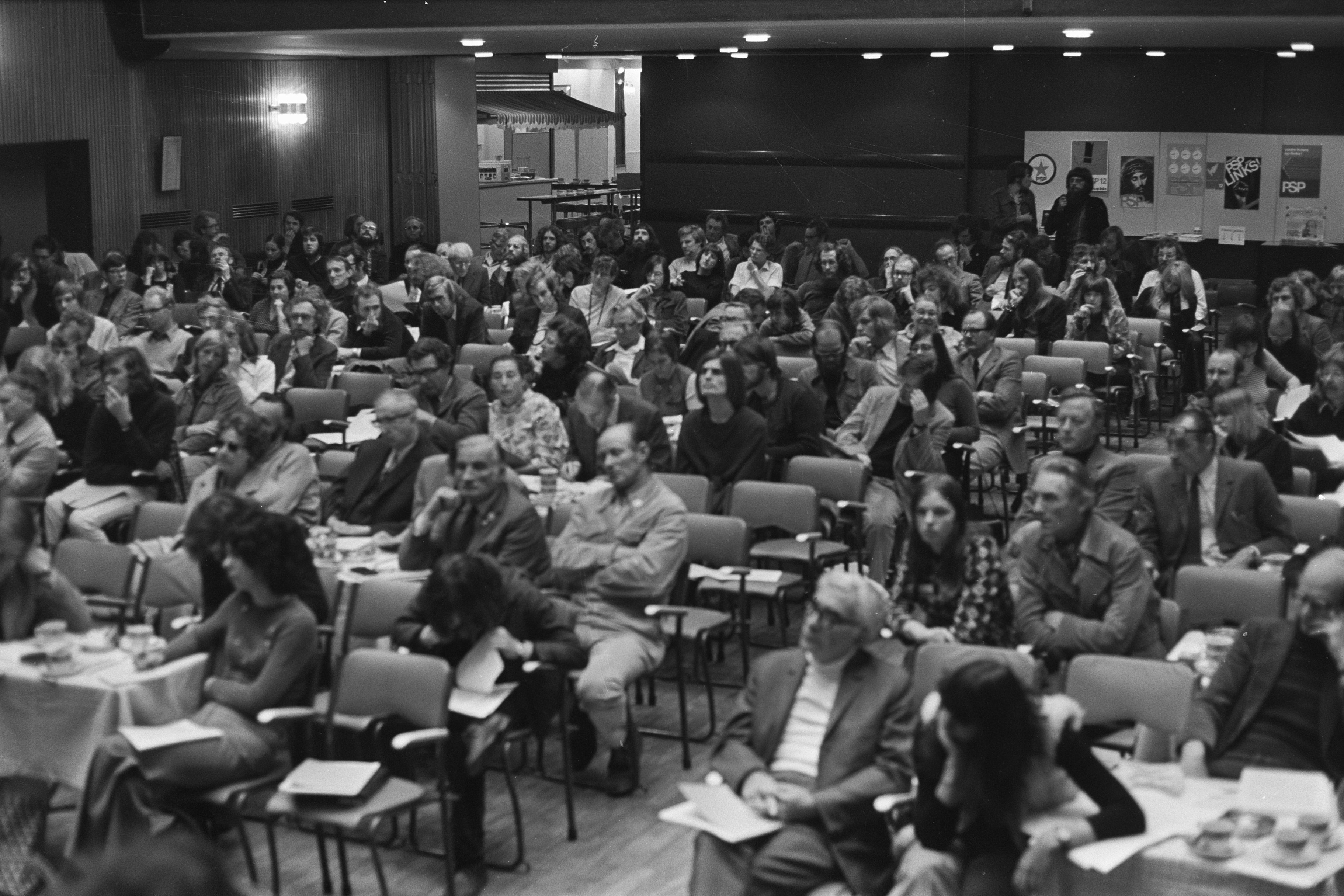 Collectie / Archief : Fotocollectie Anefo Reportage / Serie : [ onbekend ] Beschrijving : PSP-congres in Amsterdam, overzicht Datum : 16 september 1972 Locatie : Amsterdam, Noord-Holland Trefwoorden : congressen, overzichten Fotograaf : Croes, Rob C. / Anefo Auteursrechthebbende : Nationaal Archief Materiaalsoort : Negatief (zwart/wit) Nummer archiefinventaris : bekijk toegang 2.24.01.05 Bestanddeelnummer : 925-8800